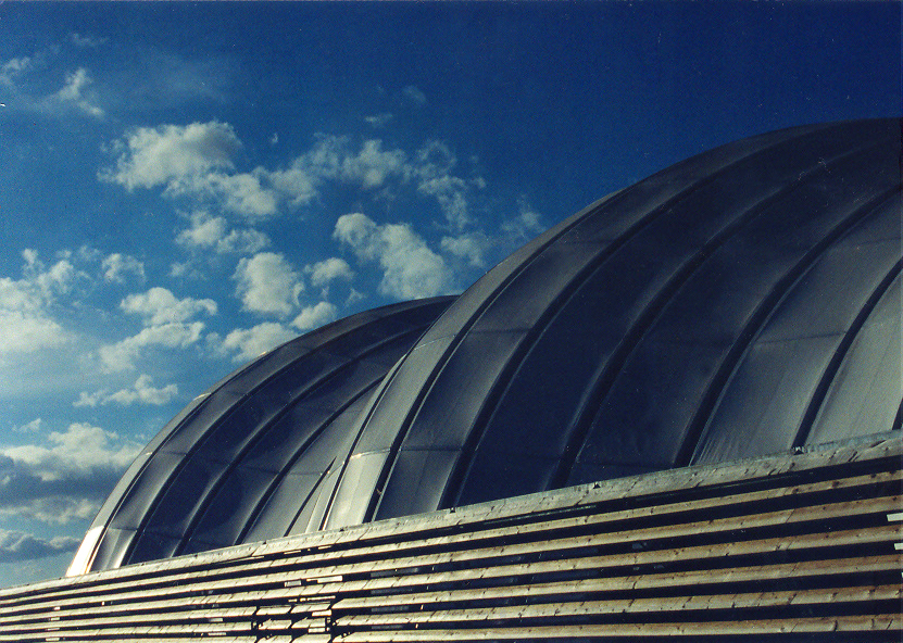 Exterior del Pabellón de Japón en la Expo 2000 Hannover